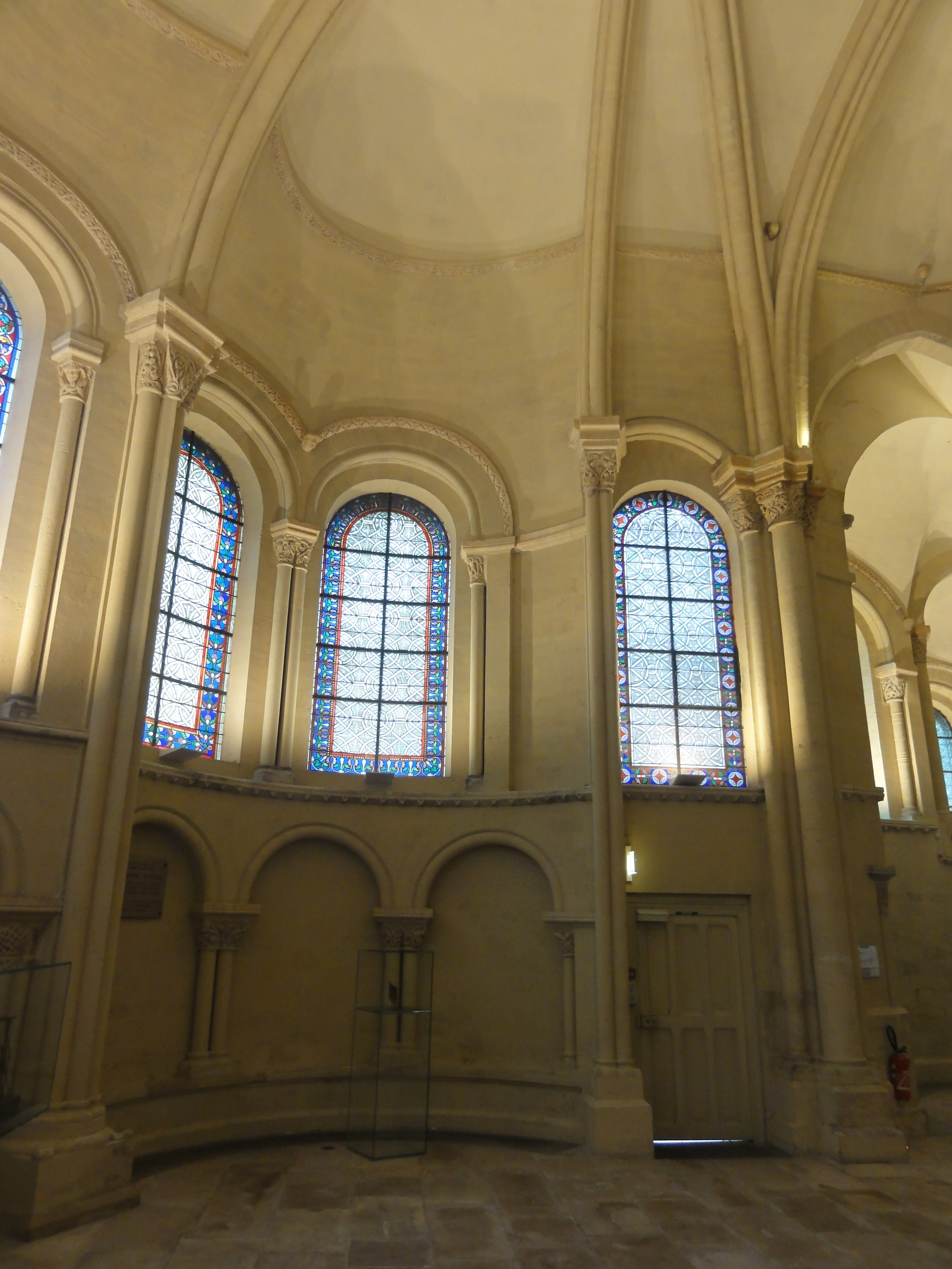 Chapelle d'axe, côté sud.